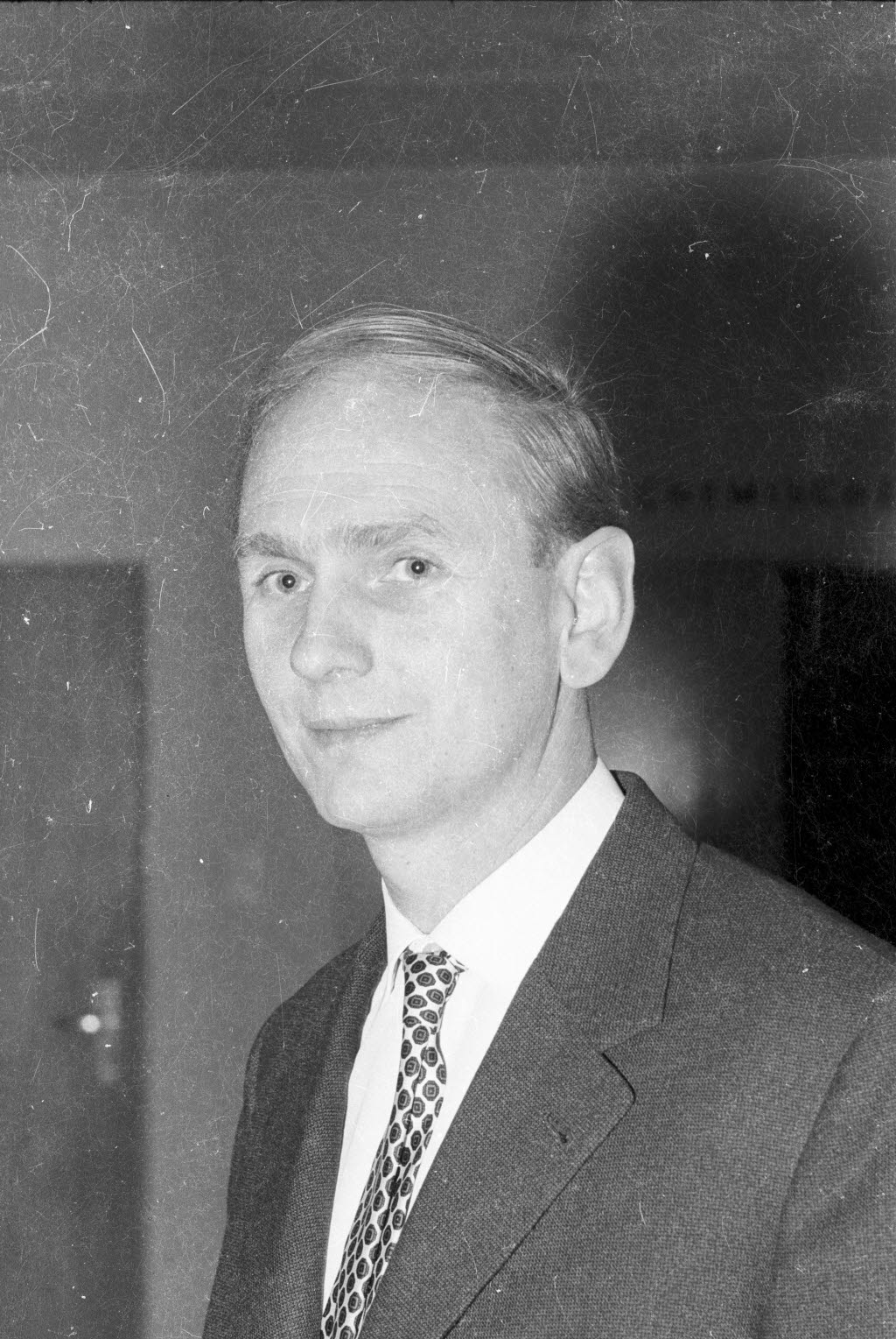 außerplanmäßiger Professor für Mikrobiologie am Institut für Meereskunde der Christian-Albrechts-Universität (CAU).